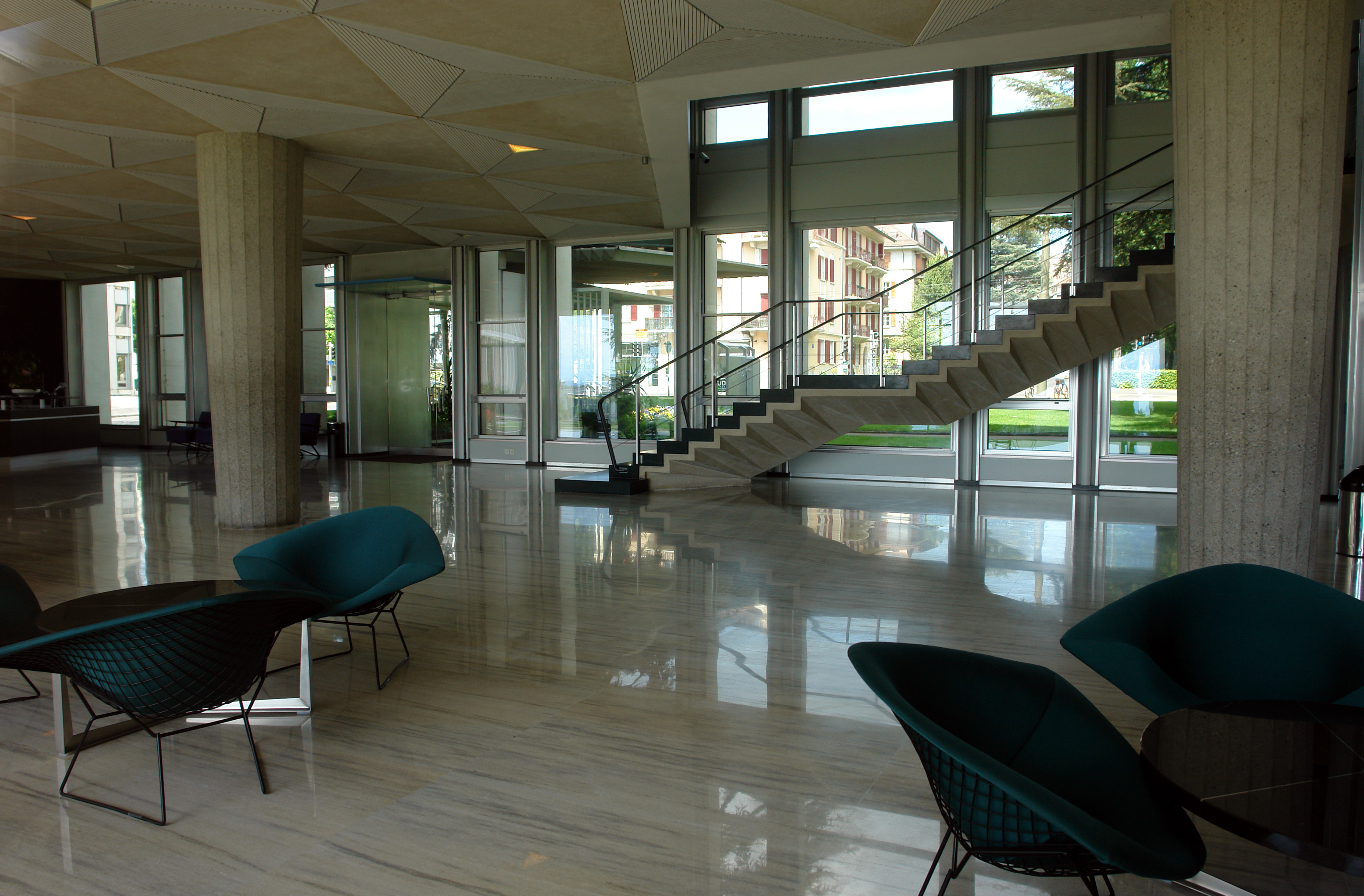 Mutuelle Vaudoise Assurance, Lausanne, 1952-56 in Switzerland, Architect: Jean Tschumi, Lobby from Garden